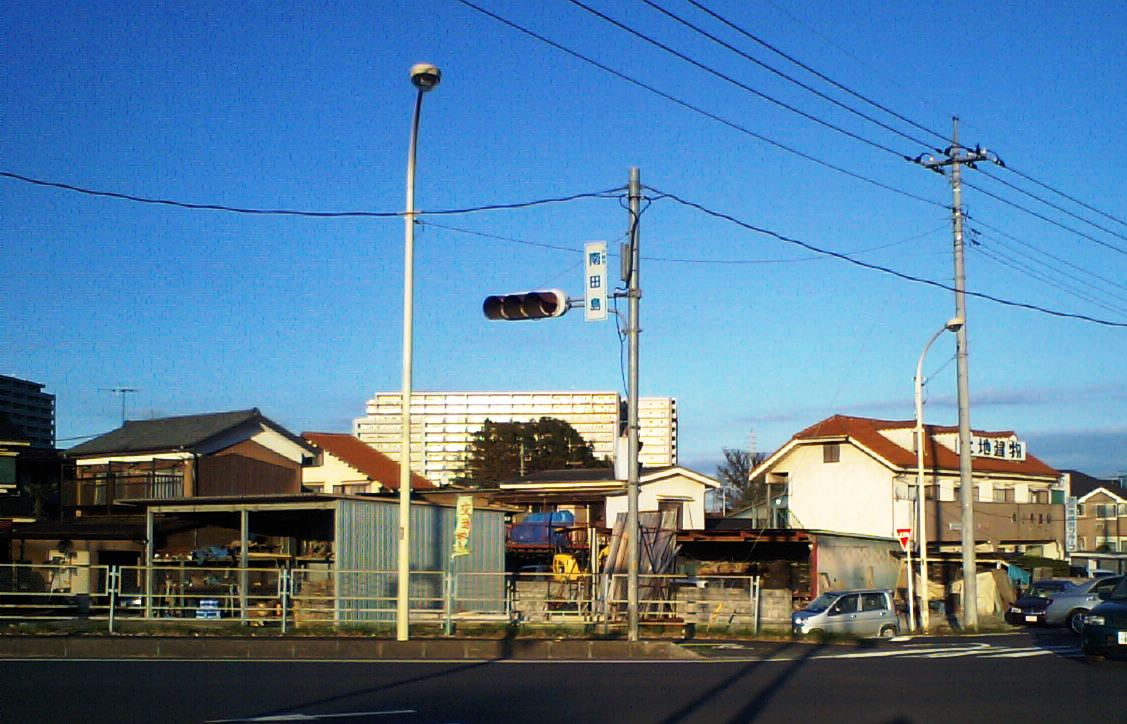 国道254号バイパス・南田島交差点（埼玉県川越市南田島）